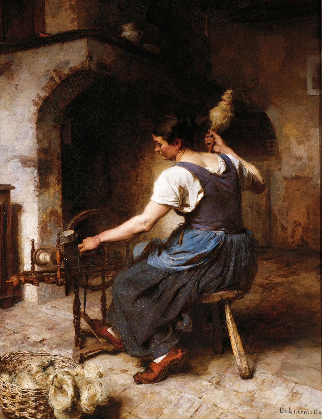 La Fileuse